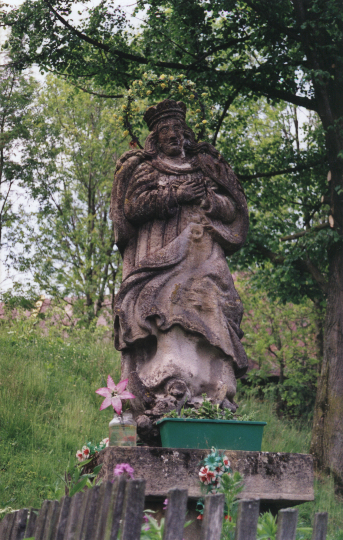 Rzeźba Matki Boskiej w Hodówce autorstwa Piotra Kułacha